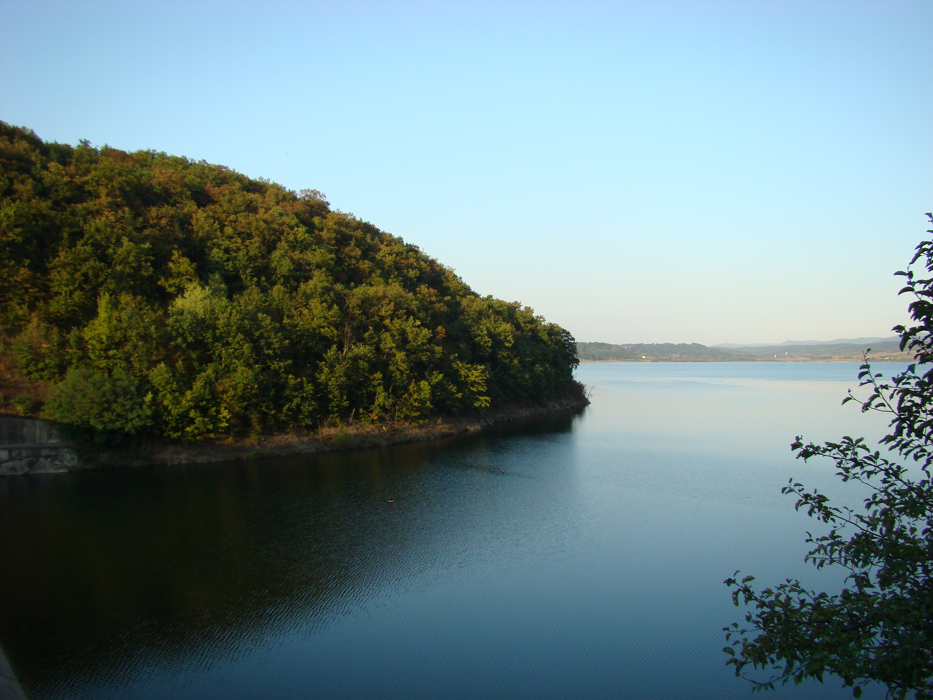 Lacul de acumulare Surduc